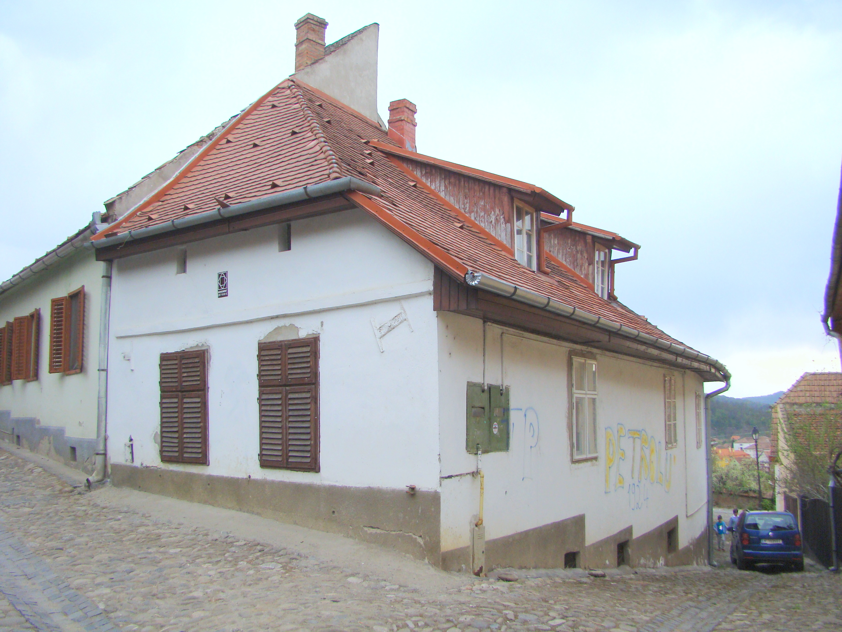 Casa Roman S., municipiul Sighișoara, tr. Cojocarilor 2 sec. XVII - XVIII